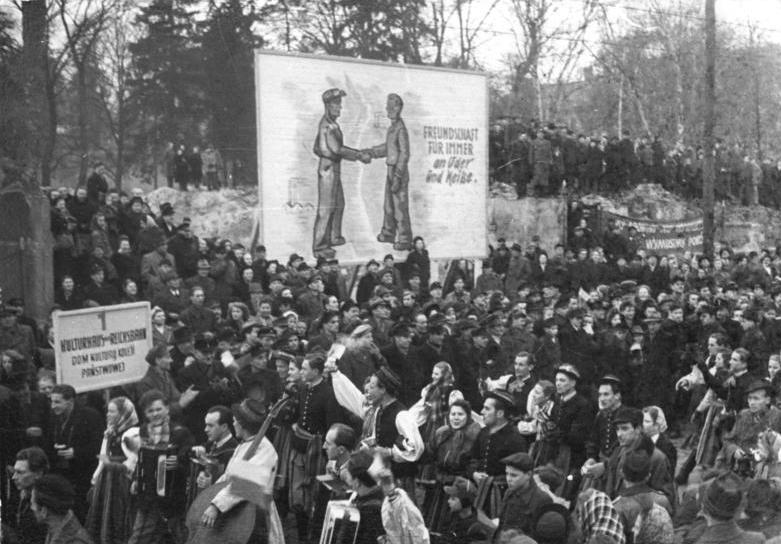 Zentralbild-Heilig 27.1.1951 Kno-Stn. Abschlussprotokoll über Oder-Neiße-Grenze unterzeichnet. Am 27. Januar 1951 wurde in Frankfurt-O. das Abschlussprotokoll der Grenzmarkierung der Oder-Neiße-Friedensgrenze unterzeichnet. Damit ist die Friedensgrenze zwischen der Republik Polen und der DDR endgültig festgelegt. UBz: Dicht gedrängt stand die Frankfurter Bevölkerung um die polnischen Delegierten zu begrüssen.